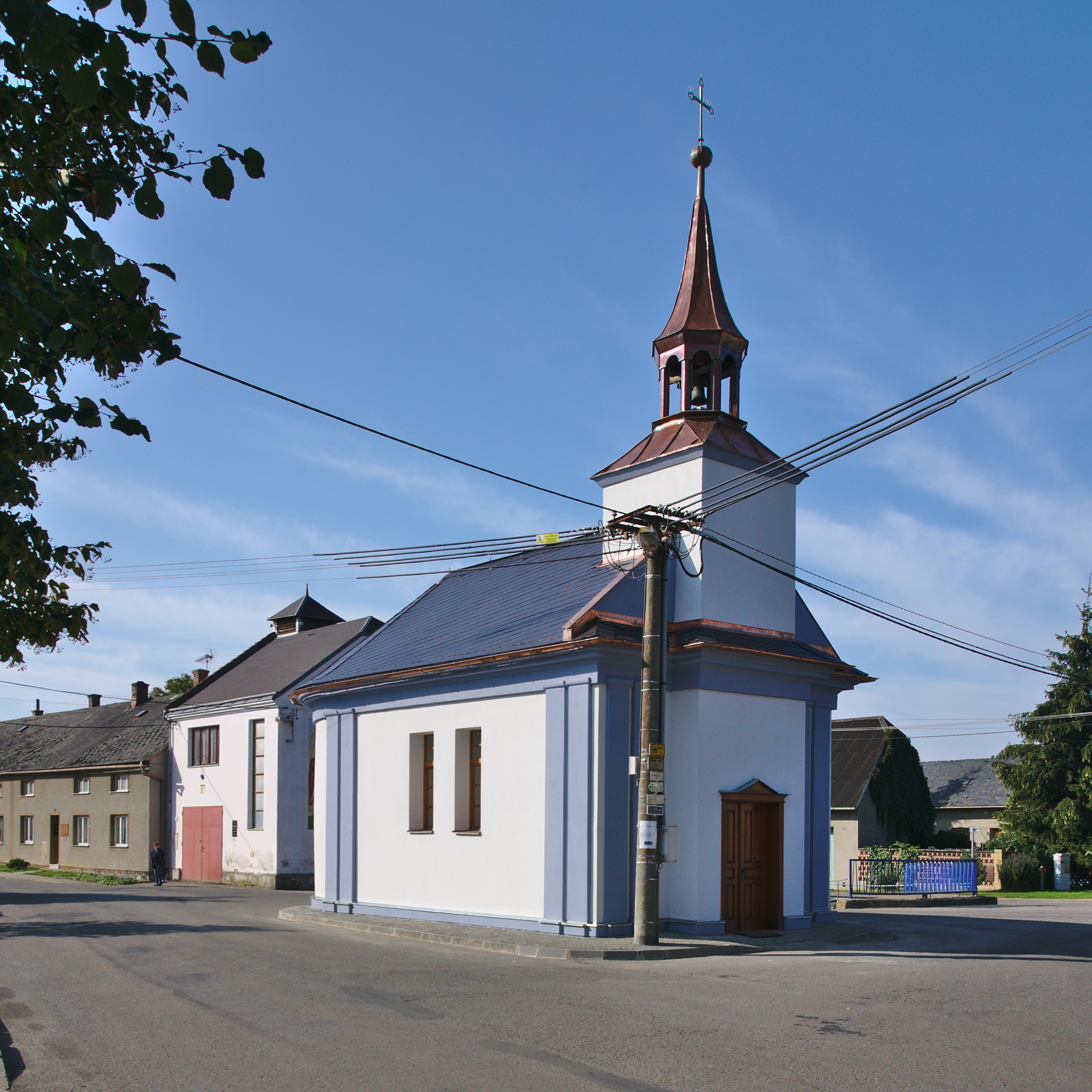 Kaple Stětí svatého Jana Křtitele, Lazníčky, okres Přerov